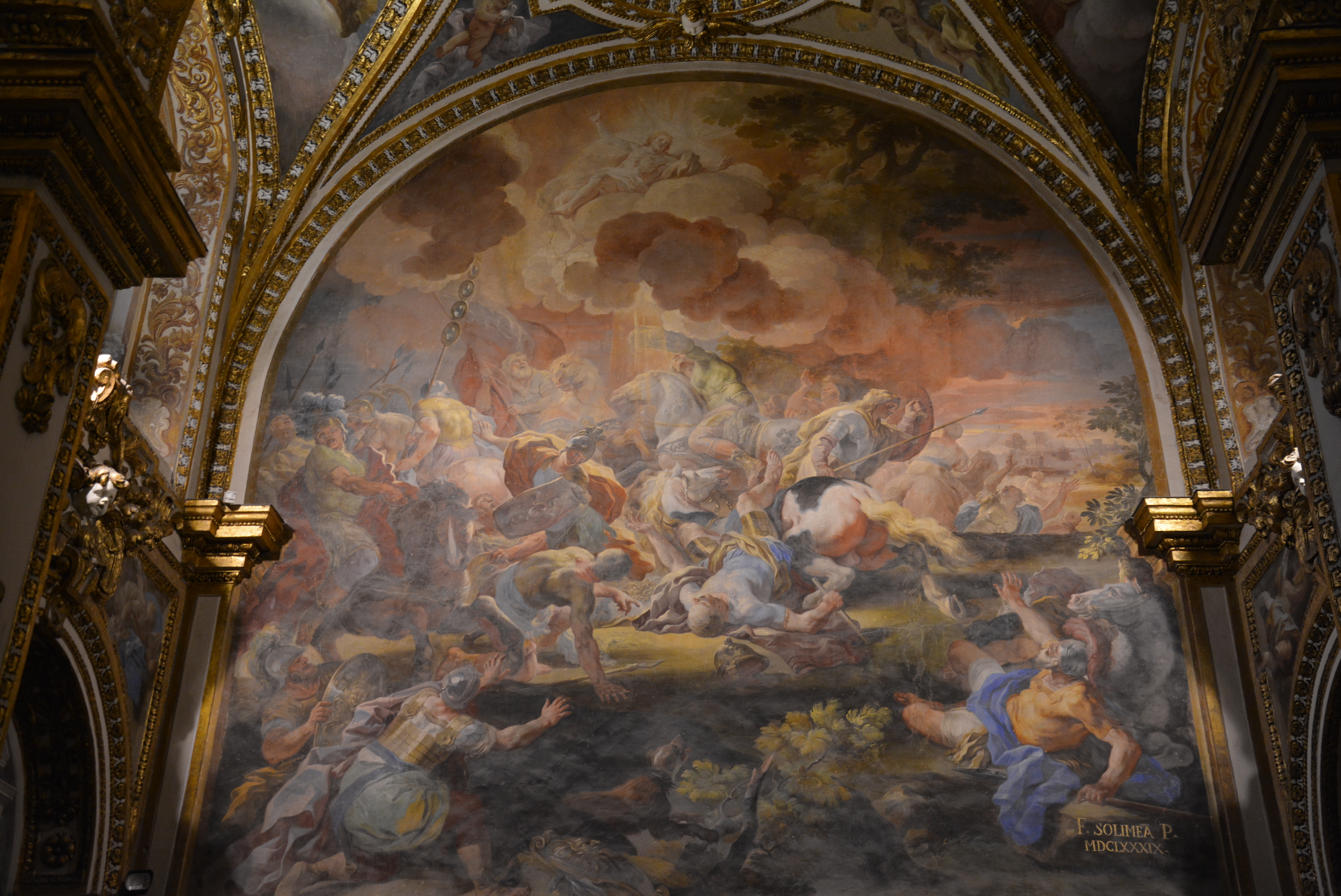 La sacrestia della basilica di San Paolo Maggiore a Napoli